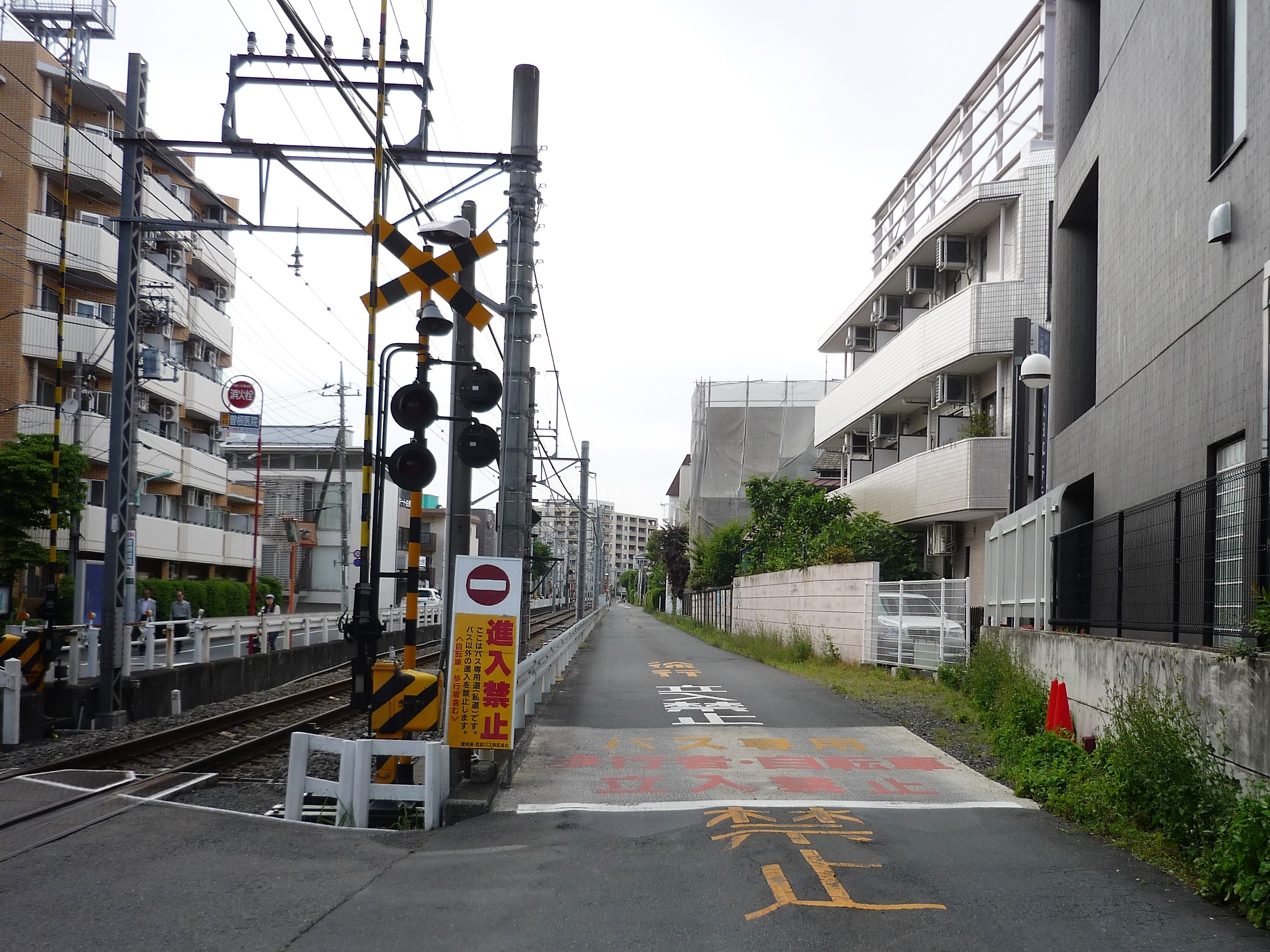 国分寺駅から多摩湖線脇に伸びるバス専用道 Panasonic Lumix DMC-FS3